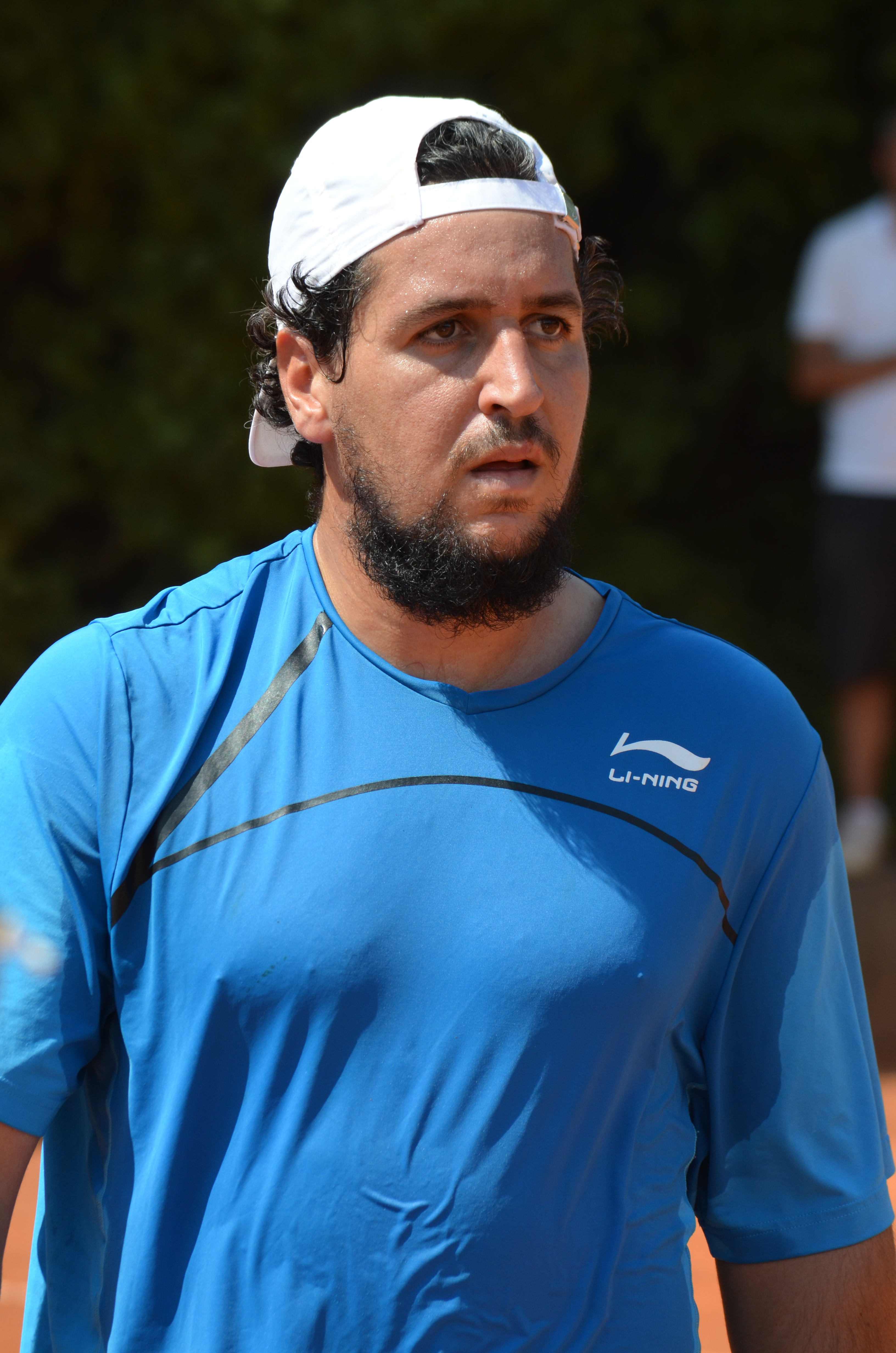 Lamine Ouahab beim Bundesligaspiel gegen den TV Reutlingen am 2. August 2015